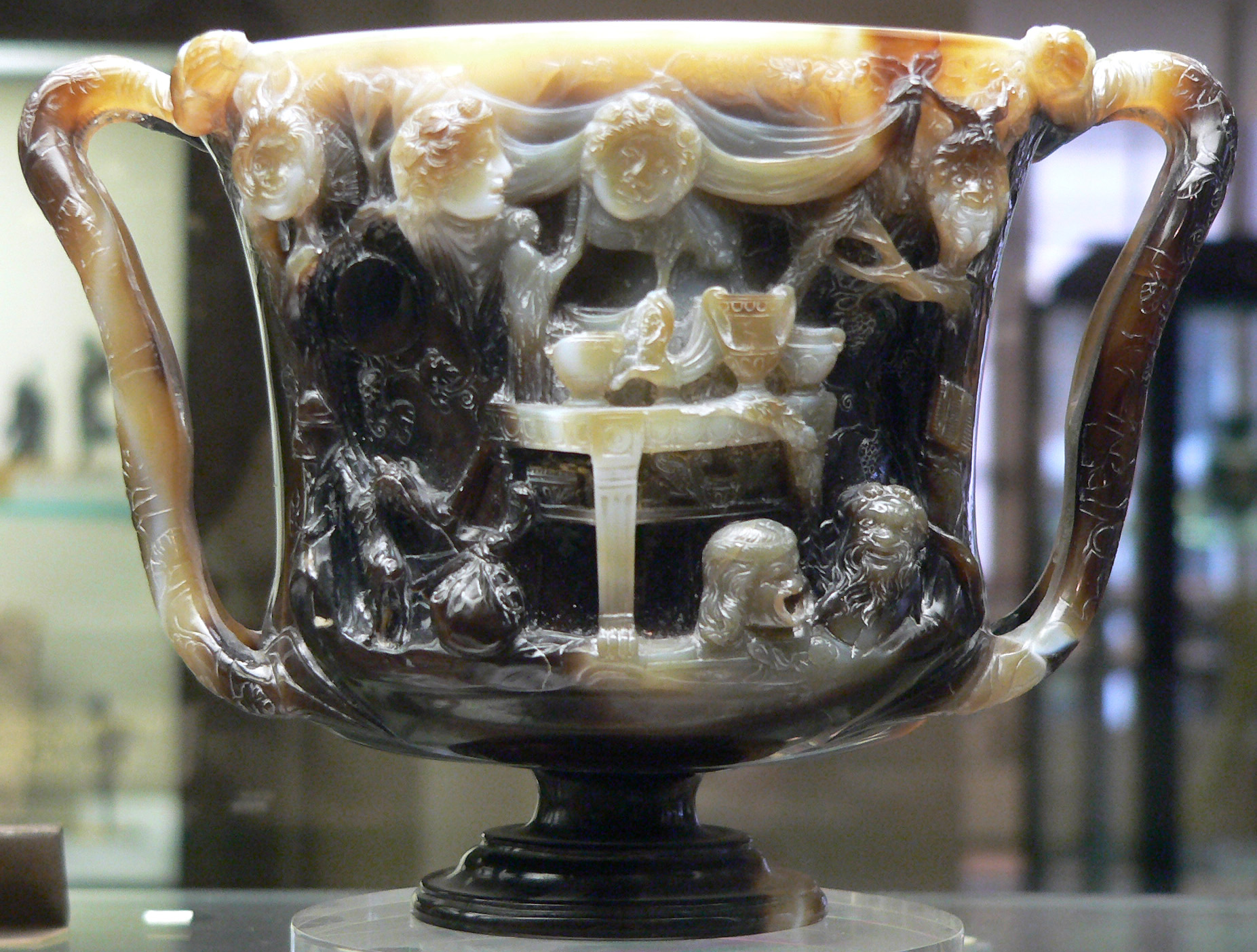 Canthare, dit Coupe des Ptolémées Canthare (2/2), sardonyx, Alexandrie (?), Ie siècle avant ou après J.-C. (?). Scènes de préparatifs d'une cérémonie dionysiaque. Il a appartenu au Trésor de Saint-Denis. Acquis en 1791.